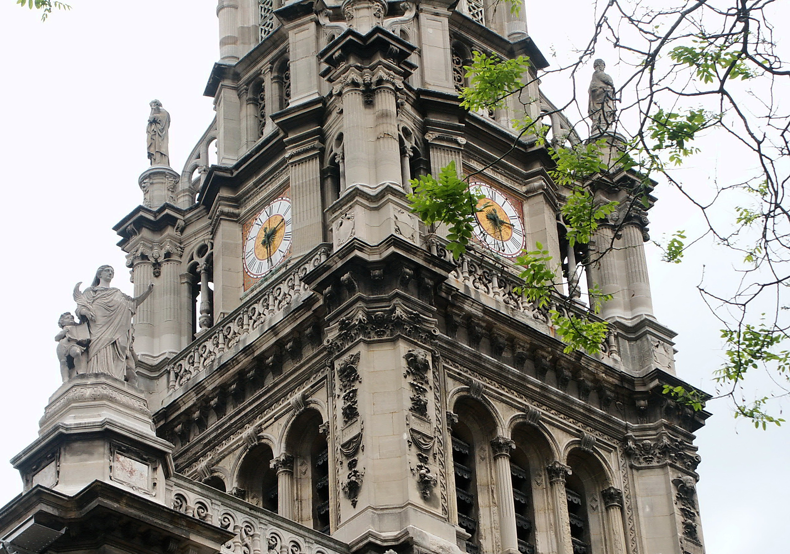 Eglise de la Sainte Trinite 聖三教堂